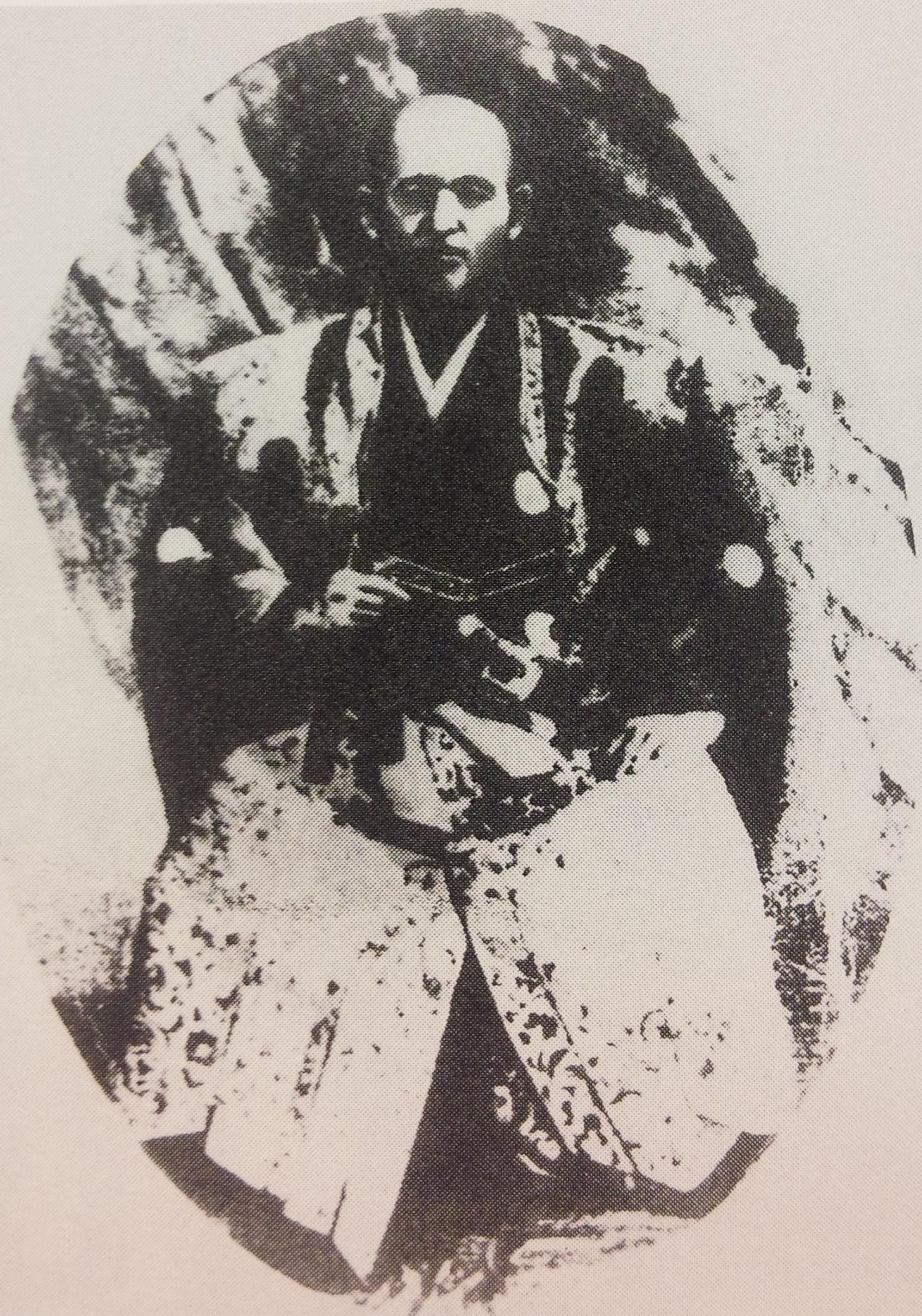 戸田氏栄の肖像写真。